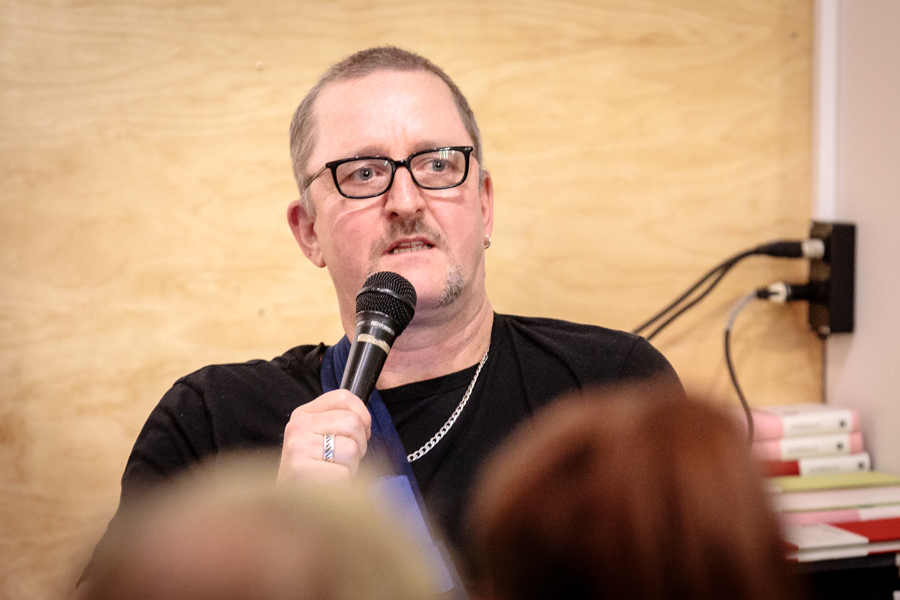 Guttorm Andreasen på boklansering av "Grenseløse opplevelser" på Tronsmo bokhandel den 08.11.2017. Arrangementet markerte starten på 25-årsjubileet til Cosmopolite. På scenen: Guttorm Andreasen (vert), Anne Ellingsen (forfatter), Arne Berg (gjest), Jan Ole Otnæs (gjest), Miloud Guiderk (gjest), Omar Guiderk (gjest) og Ivan Mazuze (saksofon).